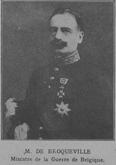 Charles de Broqueville ministre de la guerre de Belgique